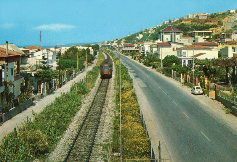 Alcamo Marina - Vista dal sovrapassaggio pedanale 02